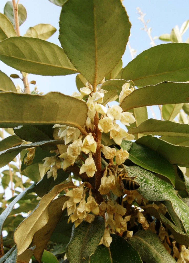 Immergrüne Ölweidenblüte